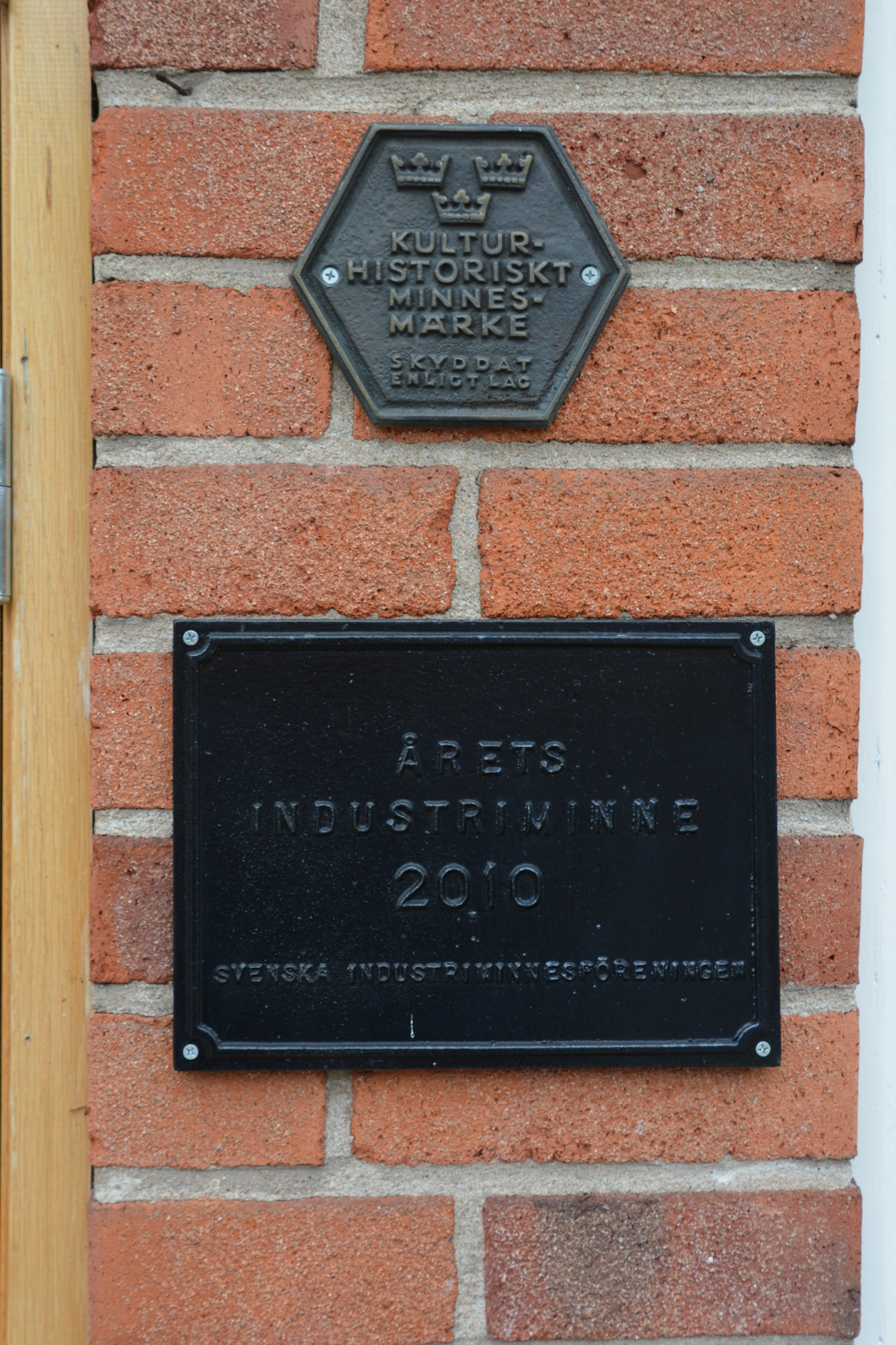 Stripa gruva, plaketter, Årets industriminne 2010 och kulturhistoriskt minnesmärke.